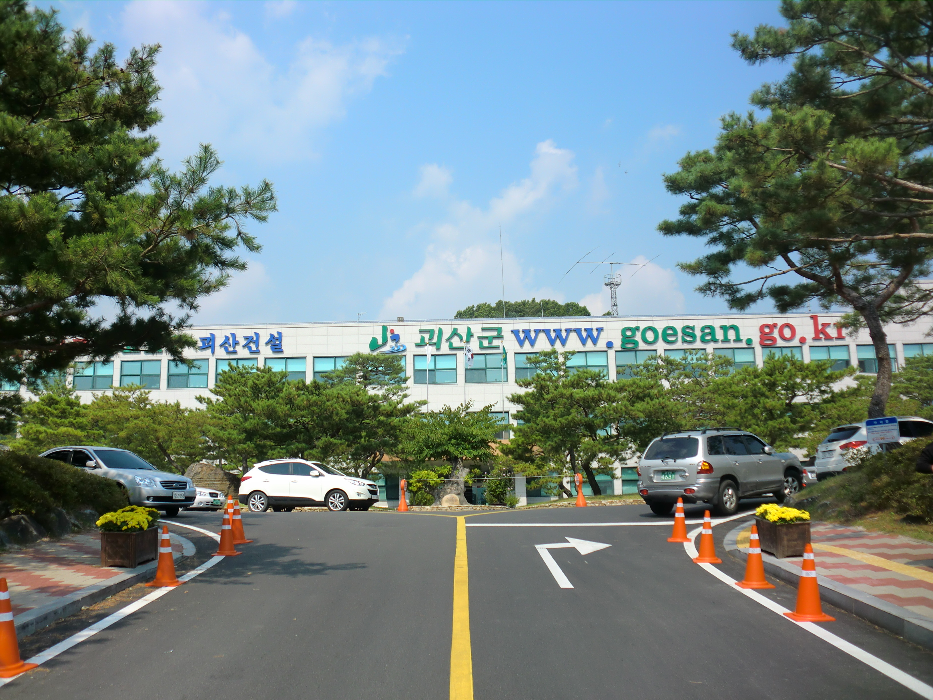 충청북도 괴산군에 있는 괴산군청